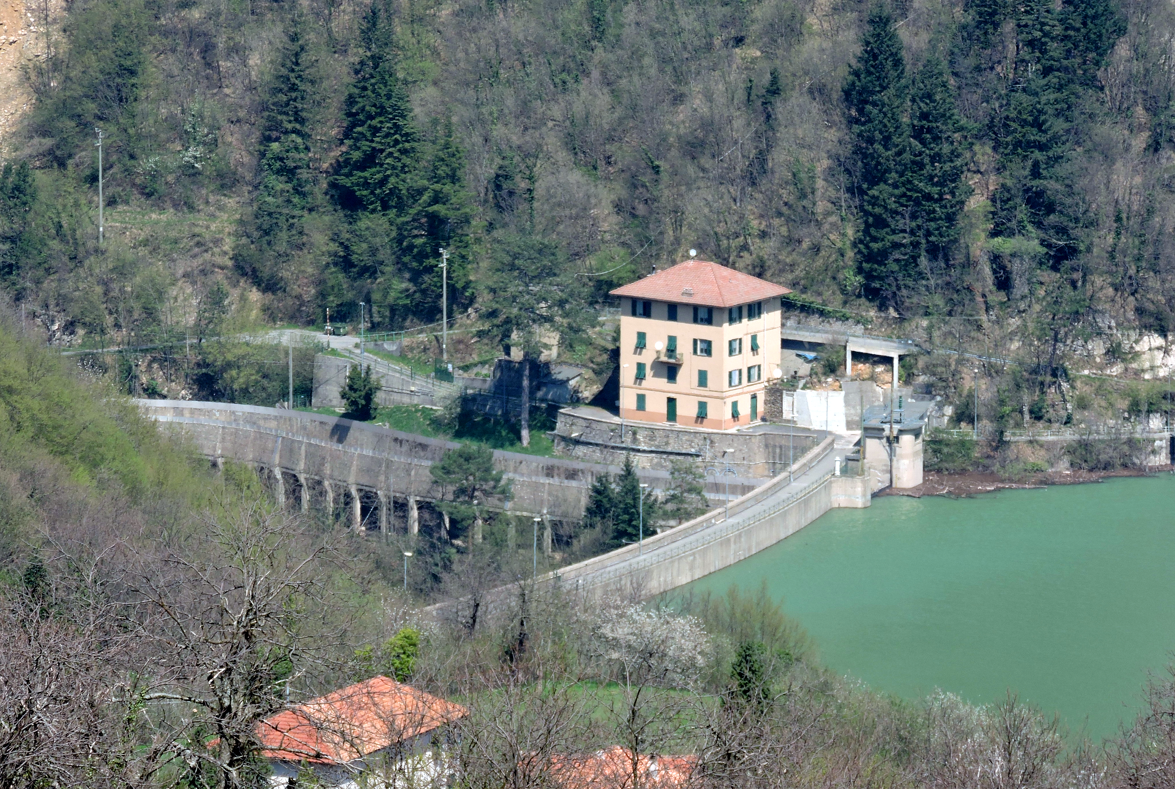 Val Noci - Torrente Geirato - Alpesisa (Q55317038)